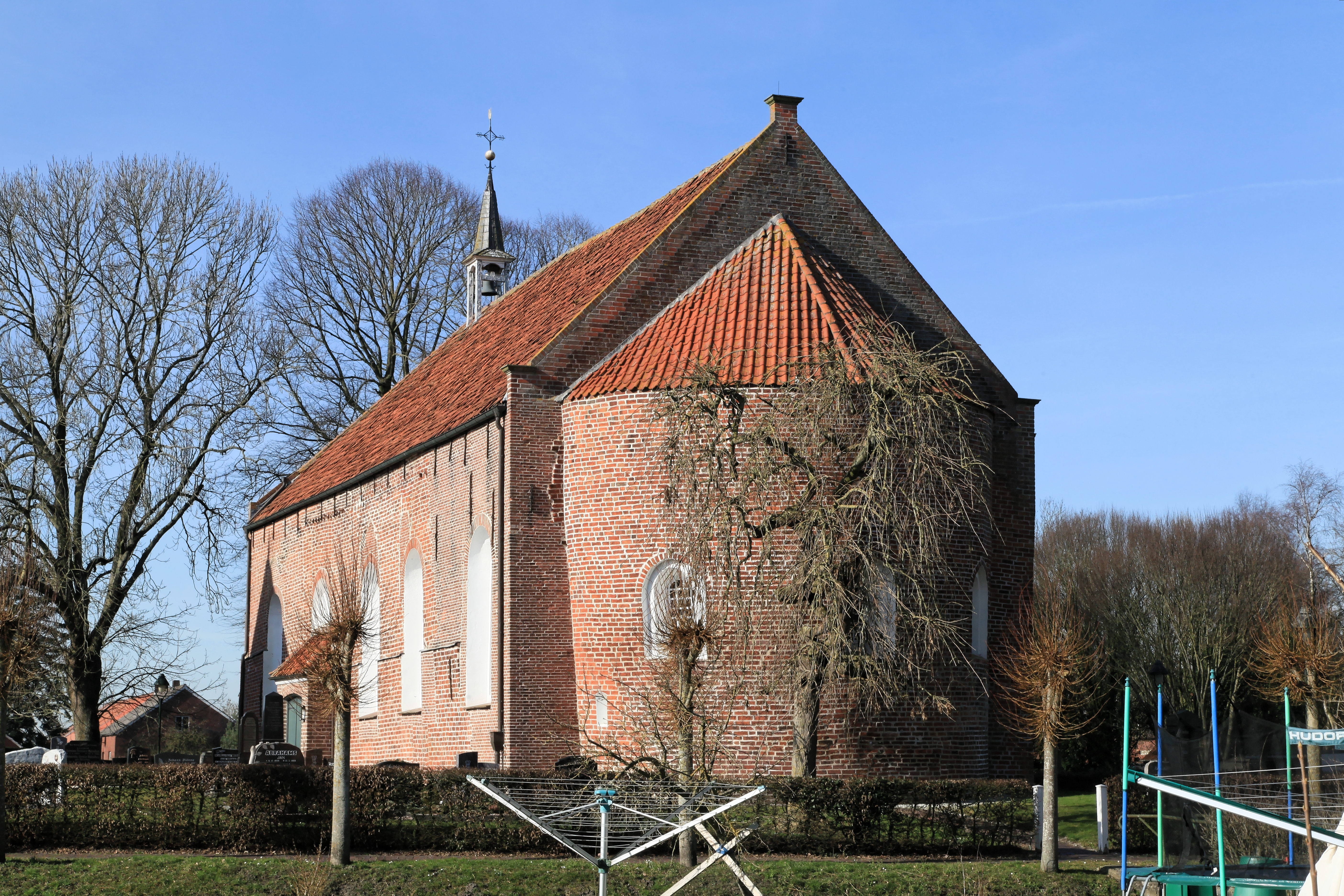 Kirche, Denkmalstraße in Midlum, Jemgum